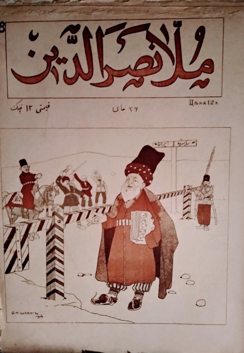 Оригинал карикатуры из журнала "Молла Насреддин"